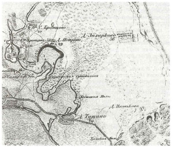 Тушино и окрестности. Фрагмент топографической карты Москвы 1818 г.